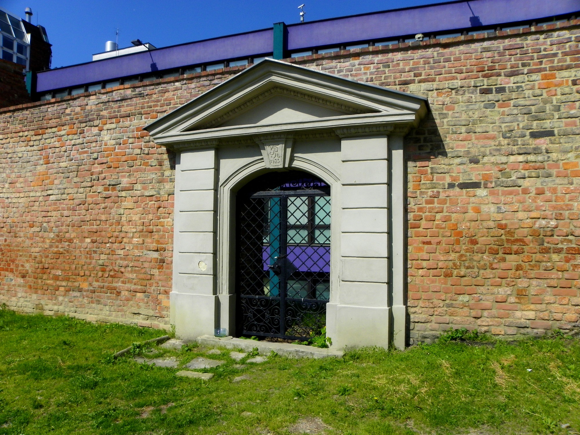 Mury miejskie na Górze Przemysła